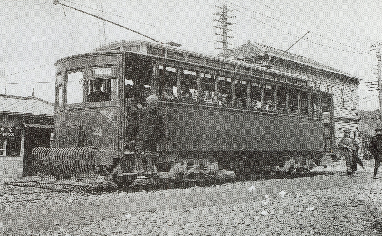 九州電気軌道の1形電車4号。中央区（後に中央町）電停付近で明治44年頃に撮影。